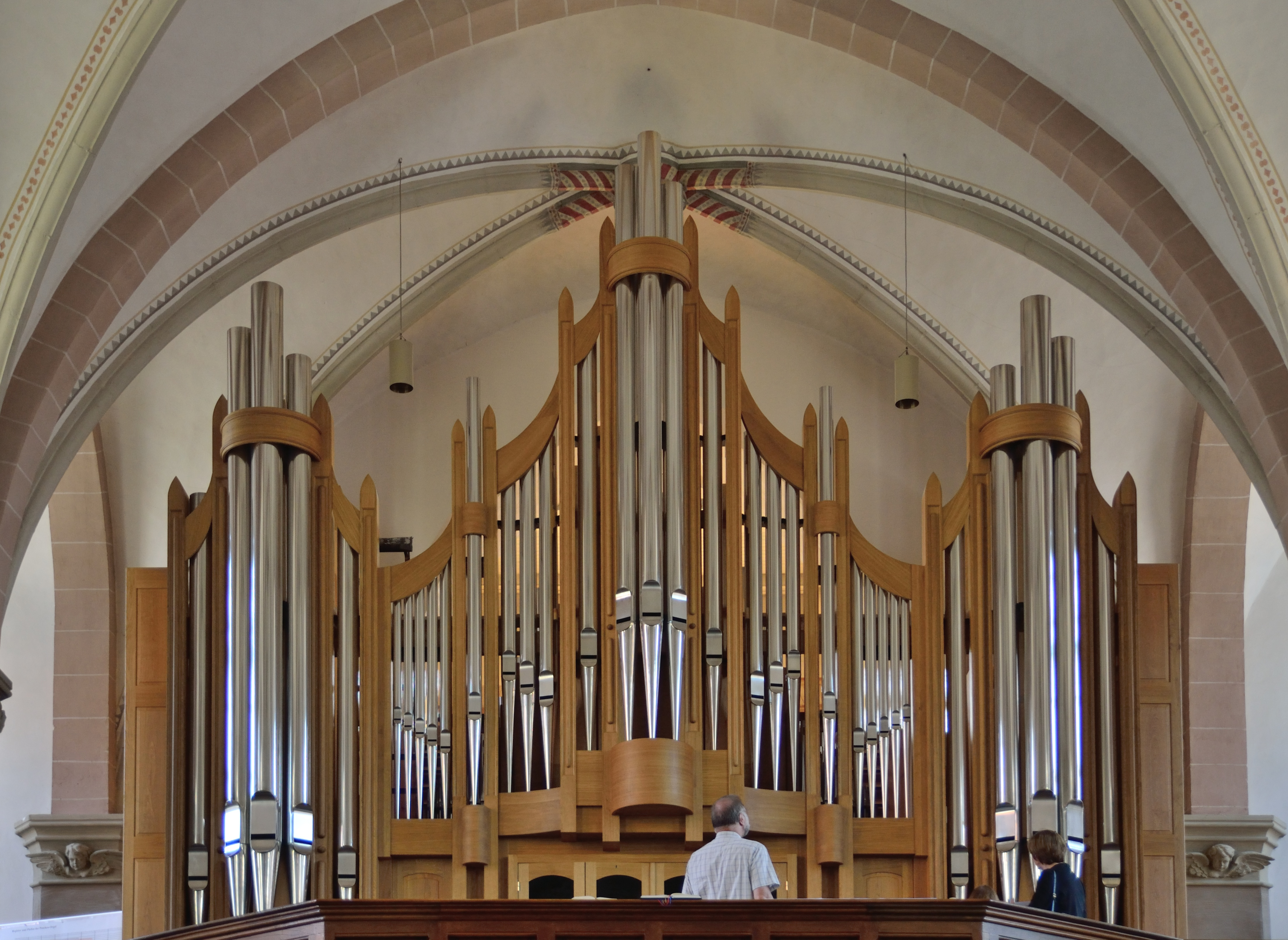 Orgel in der Detmolder Martin-Luther-Kirche